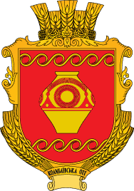 Герб Колибаївської територіальної громади